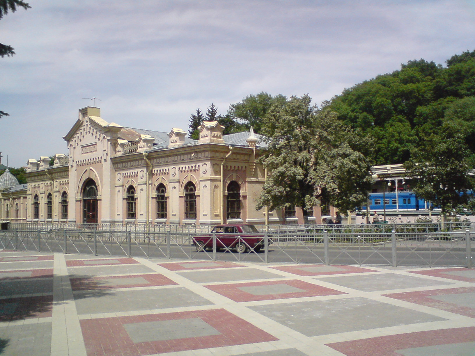 Вид со стороны Курортного бульвара